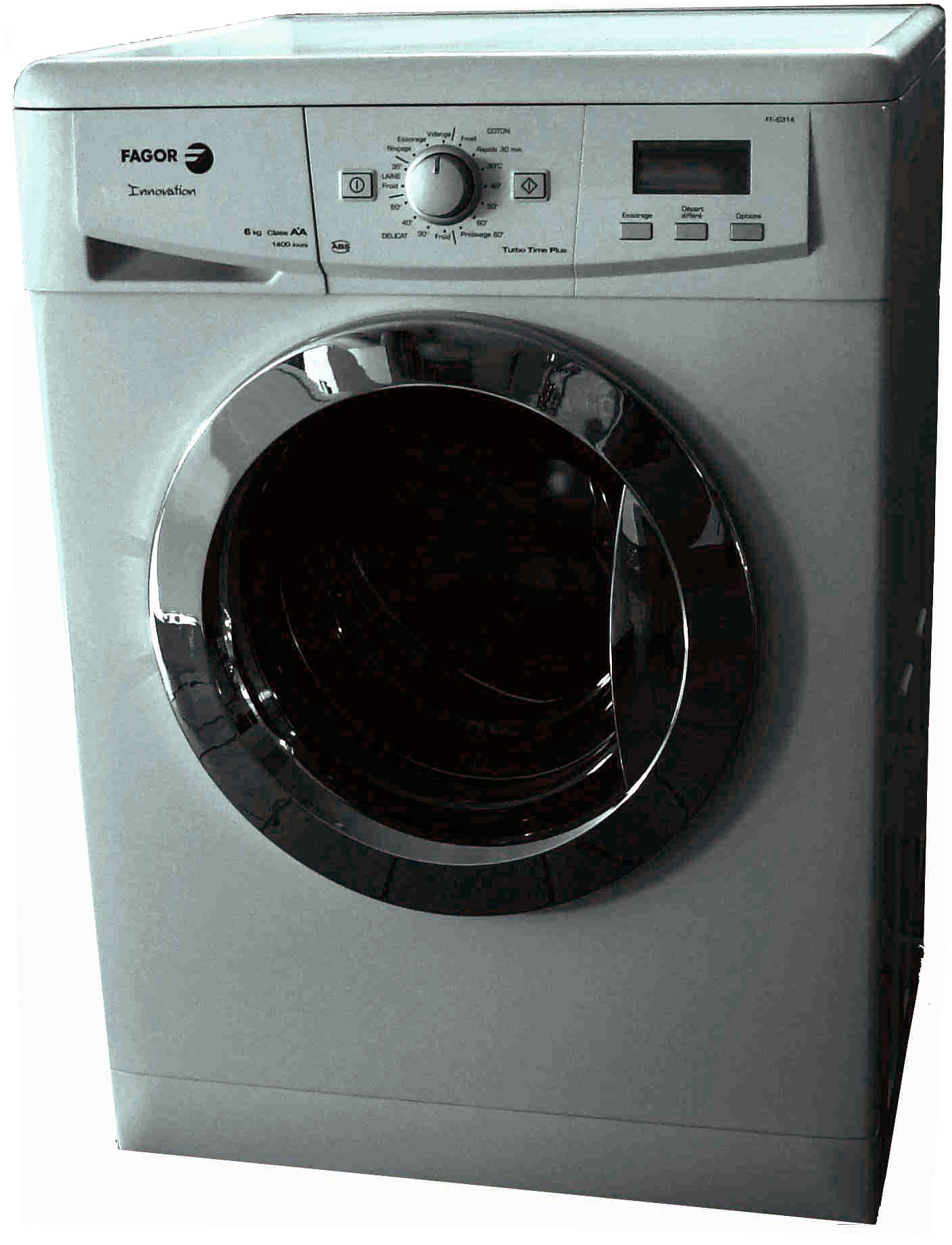 Machine à laver Fagor front